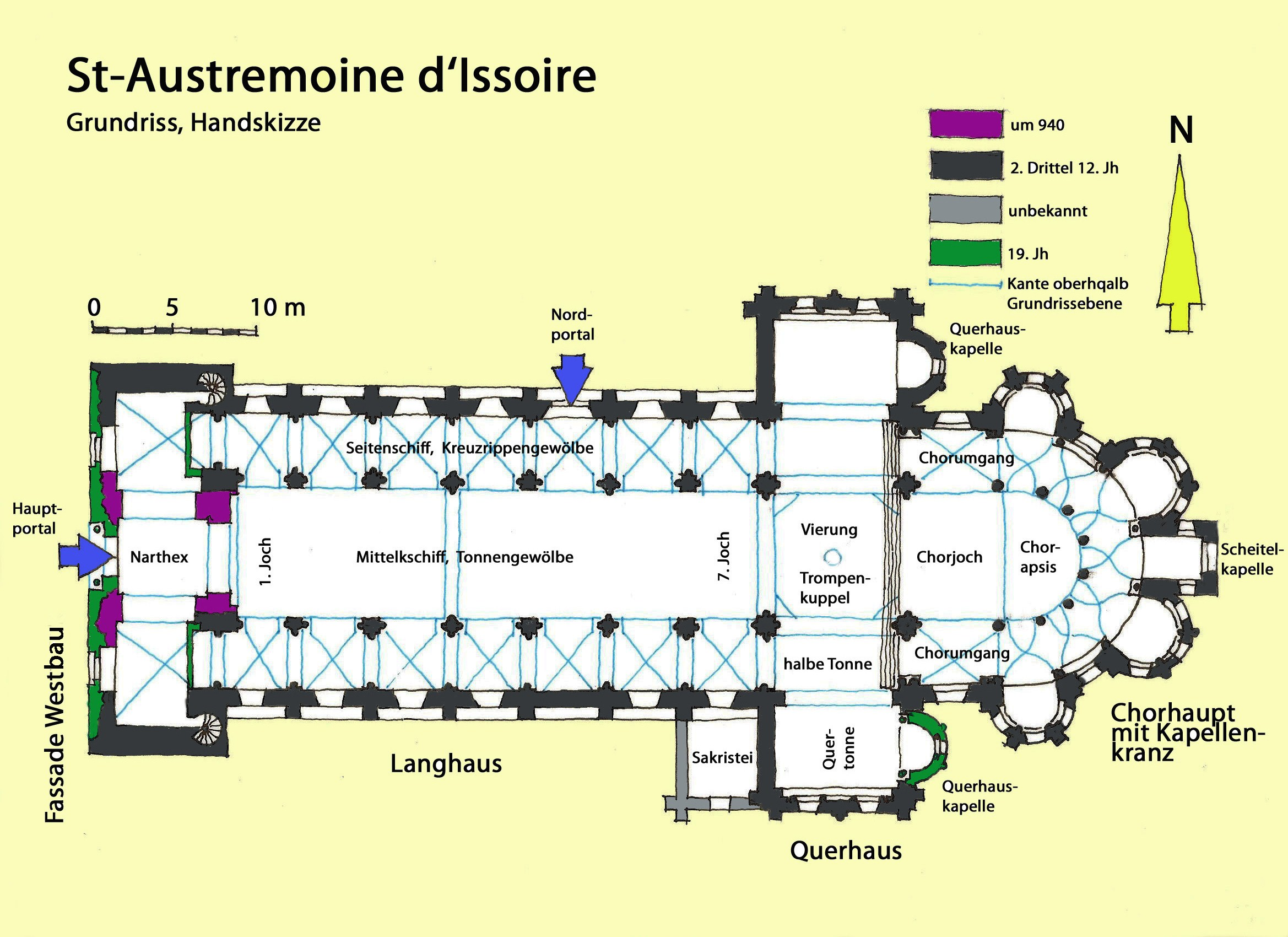 St-Austremoine_d'Issoire.Grundriss, Handskizze